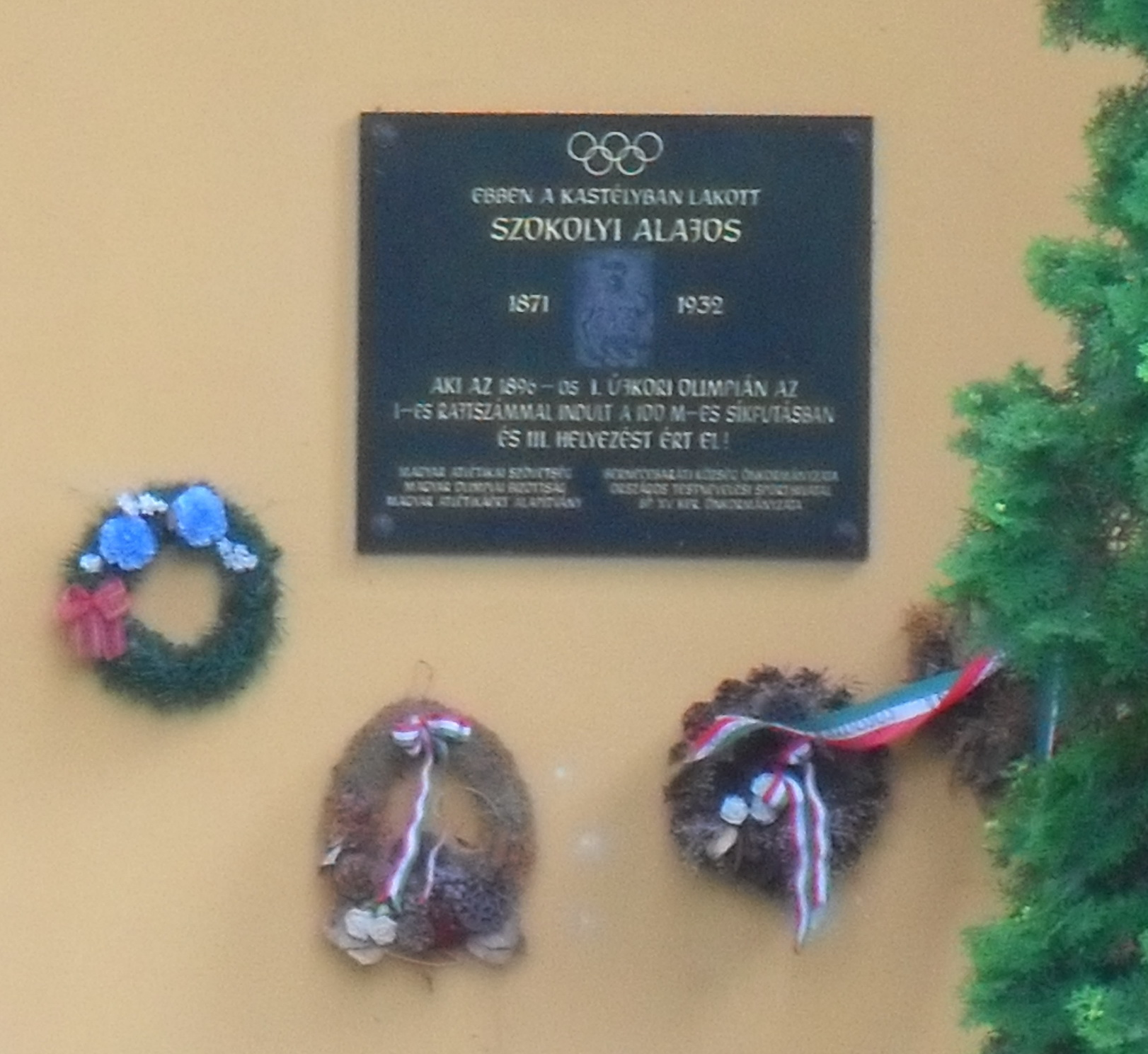 Bernecebaráti - Szokolyi Alajos-emléktábla